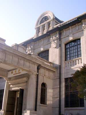 한국은행화폐금융박물관